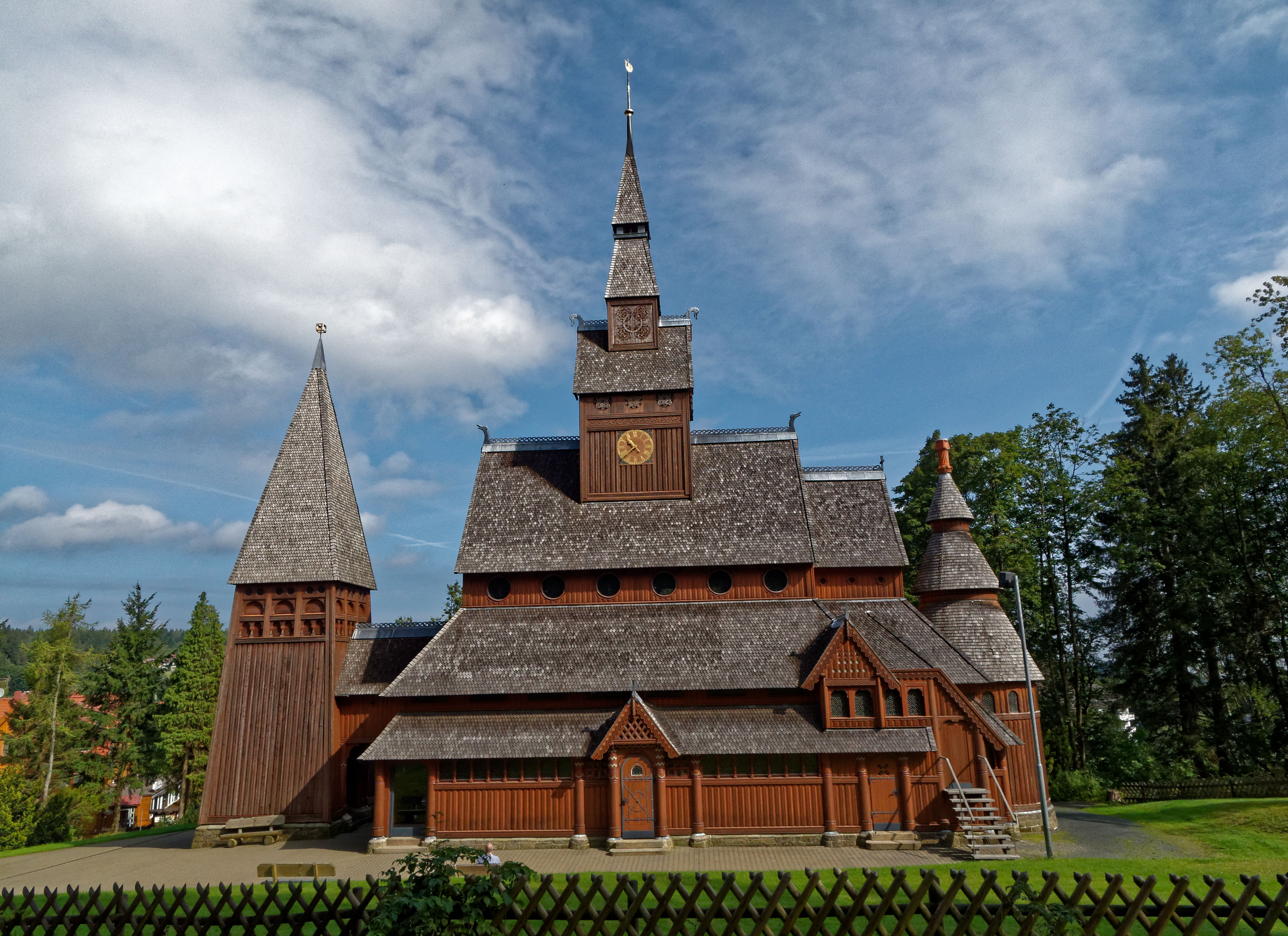 Blick von Süden auf die Stabkirche in Hahnenklee